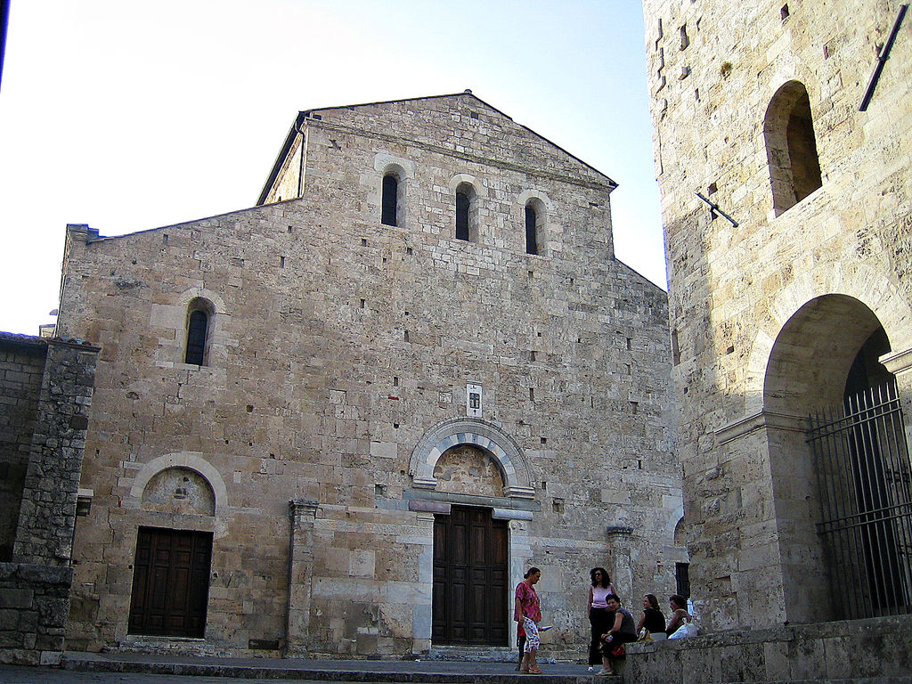 Anagni, Lazio, Italia